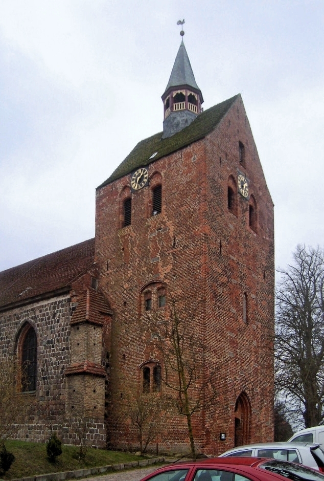 Nikolaikirche Dassow im Landkreis Nordwestmecklenburg. Turm aus dem. 16. Jh.